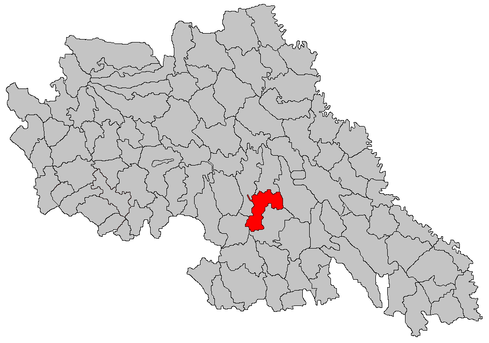 Categorie:Hărţi ale judeţului Iaşi